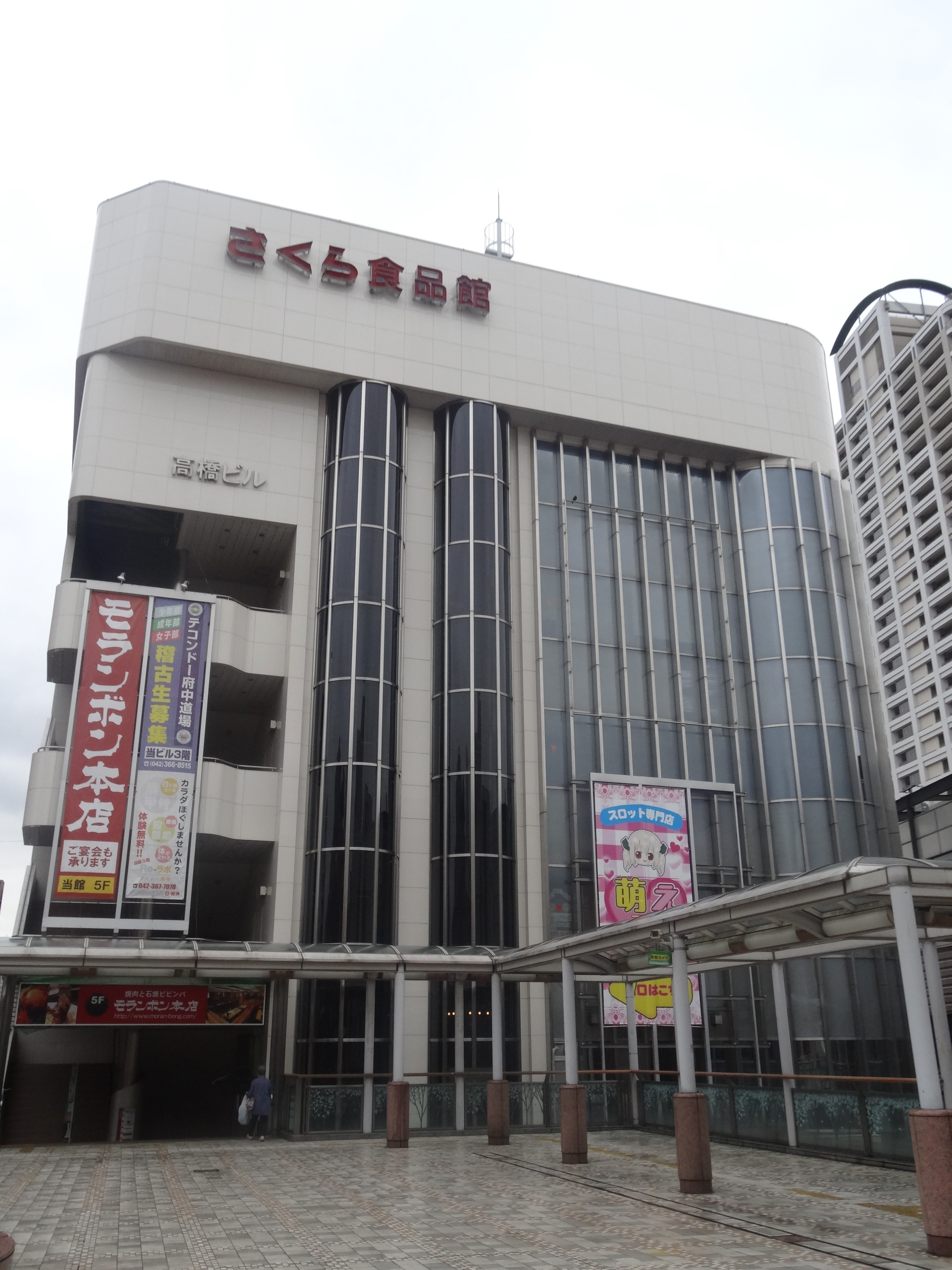 府中駅前の高橋ビル（さくら食品館）。モランボン本店などが入る。